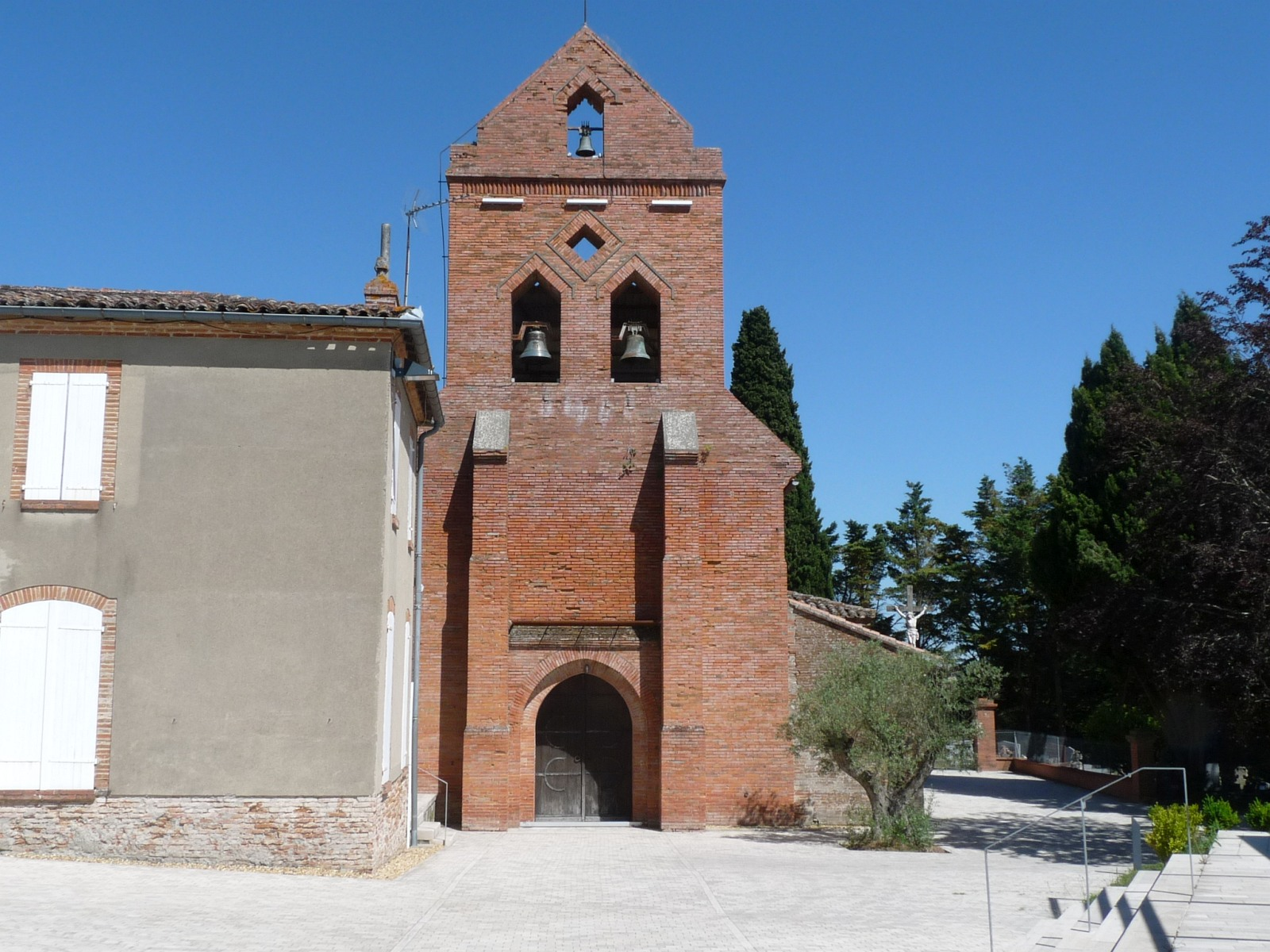 Eglise de Préserville, Haute-Garonne, France